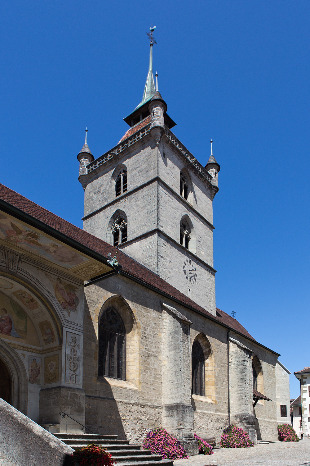 Kollegiatskirche mitten in Estavayer-le-Lac (FR)